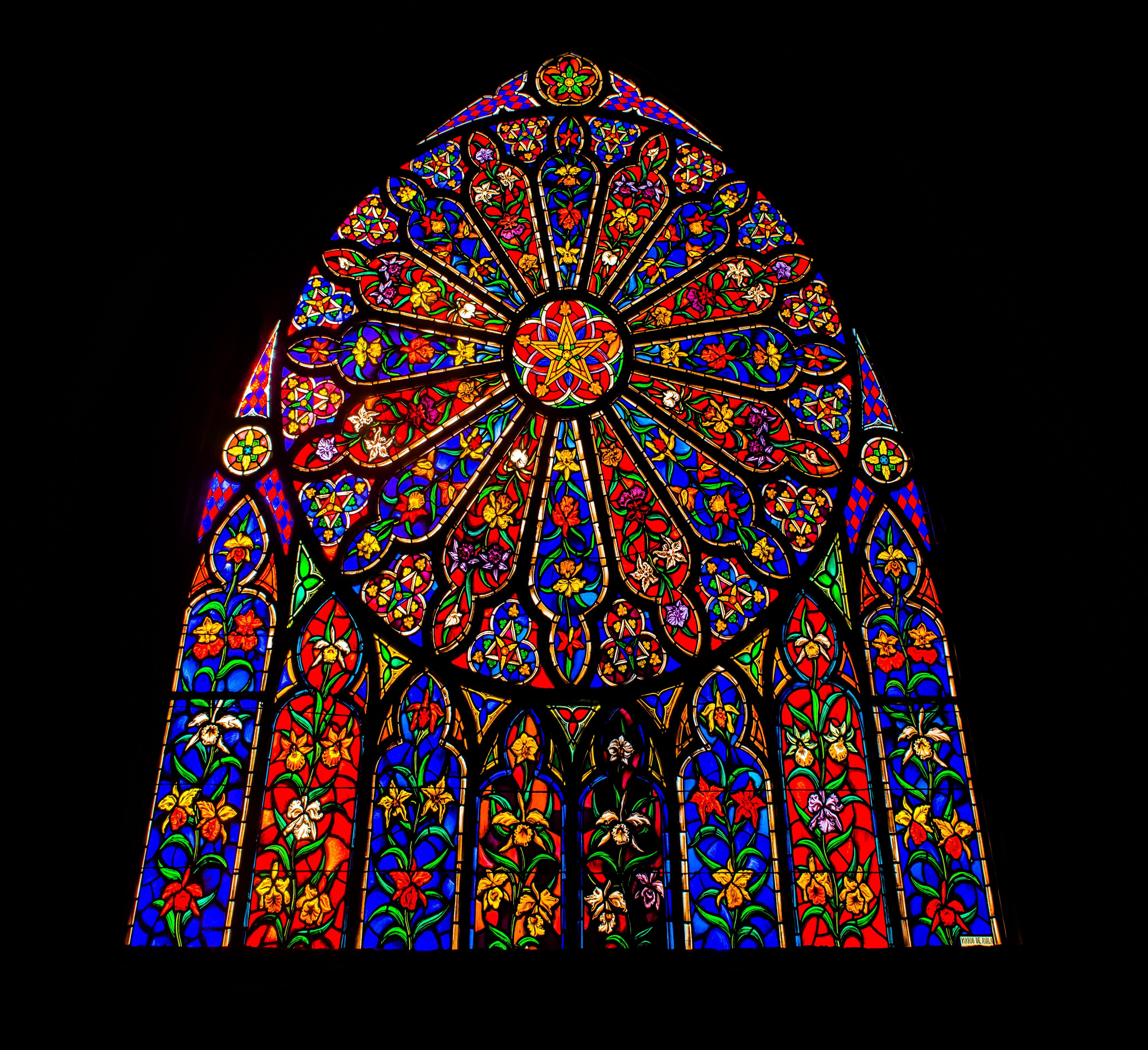 Vitral interno en la parte posterior de la iglesia del Carmen en Panamá.